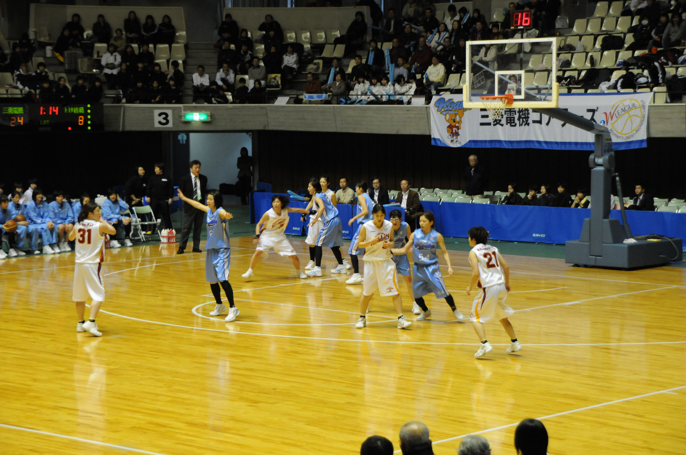 WJBL 10-11レギュラーリーグ WI、トヨタ紡織対三菱電機。秋田県立体育館で。